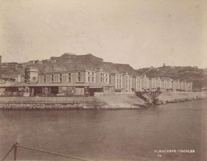 Almacenes Fiscales de Valparaíso en 1888. Fotografías de Félix Leblanc.